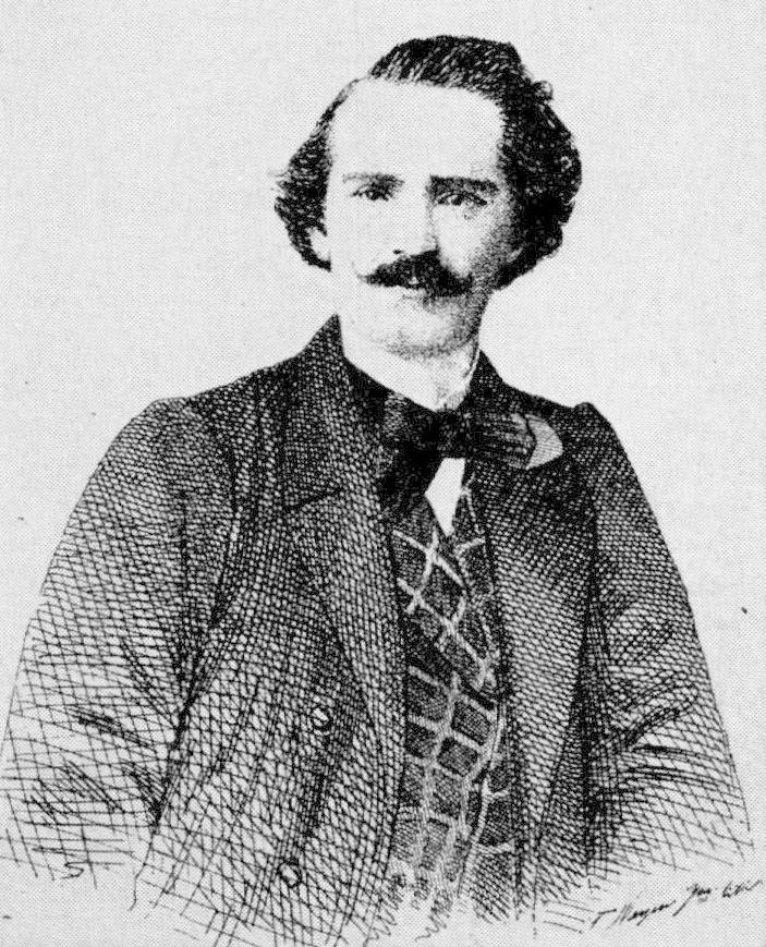 Христиан Иогансон, танцовщик